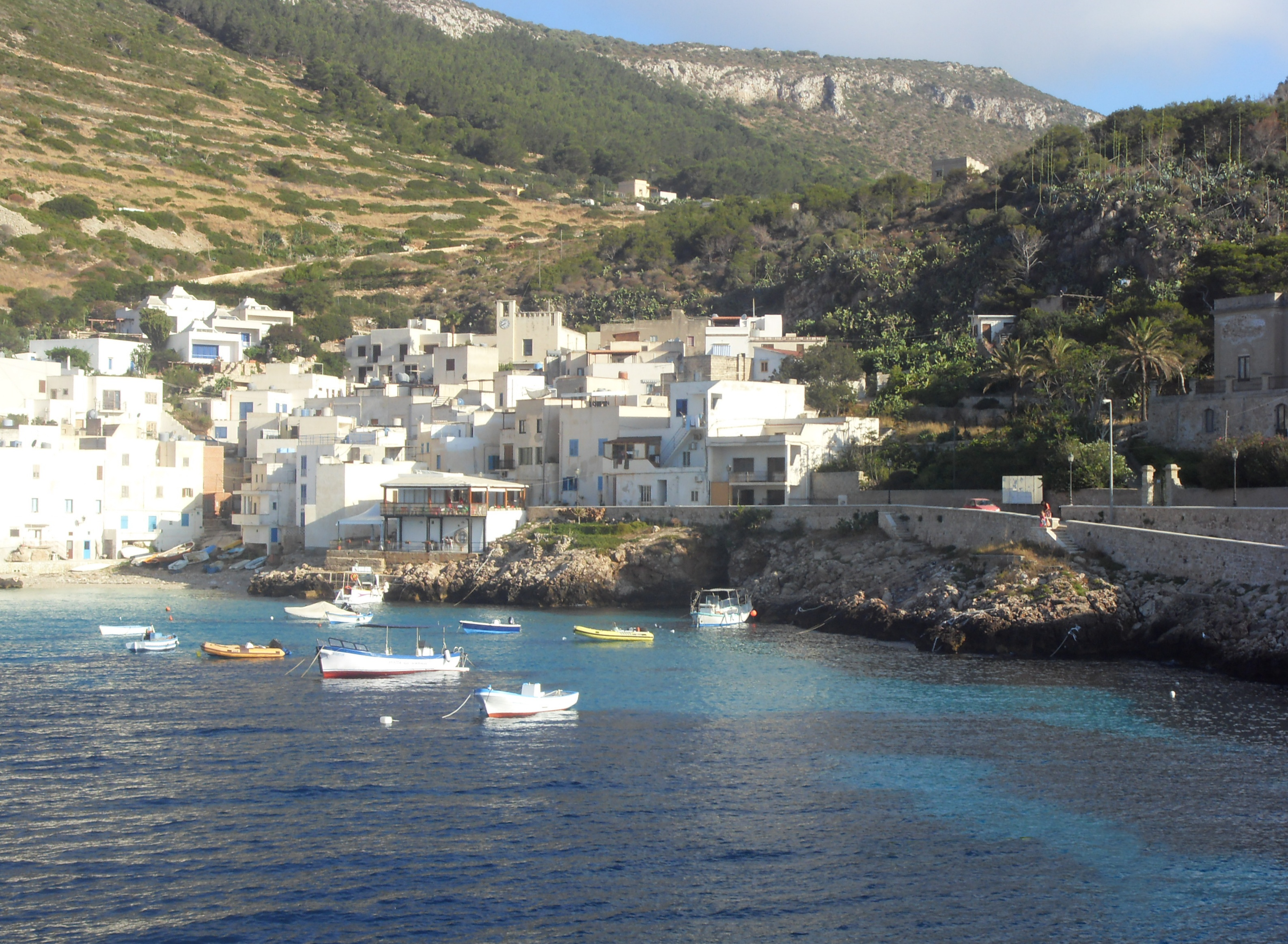 Questo file raffigura il porticciolo di Levanzo (TP)